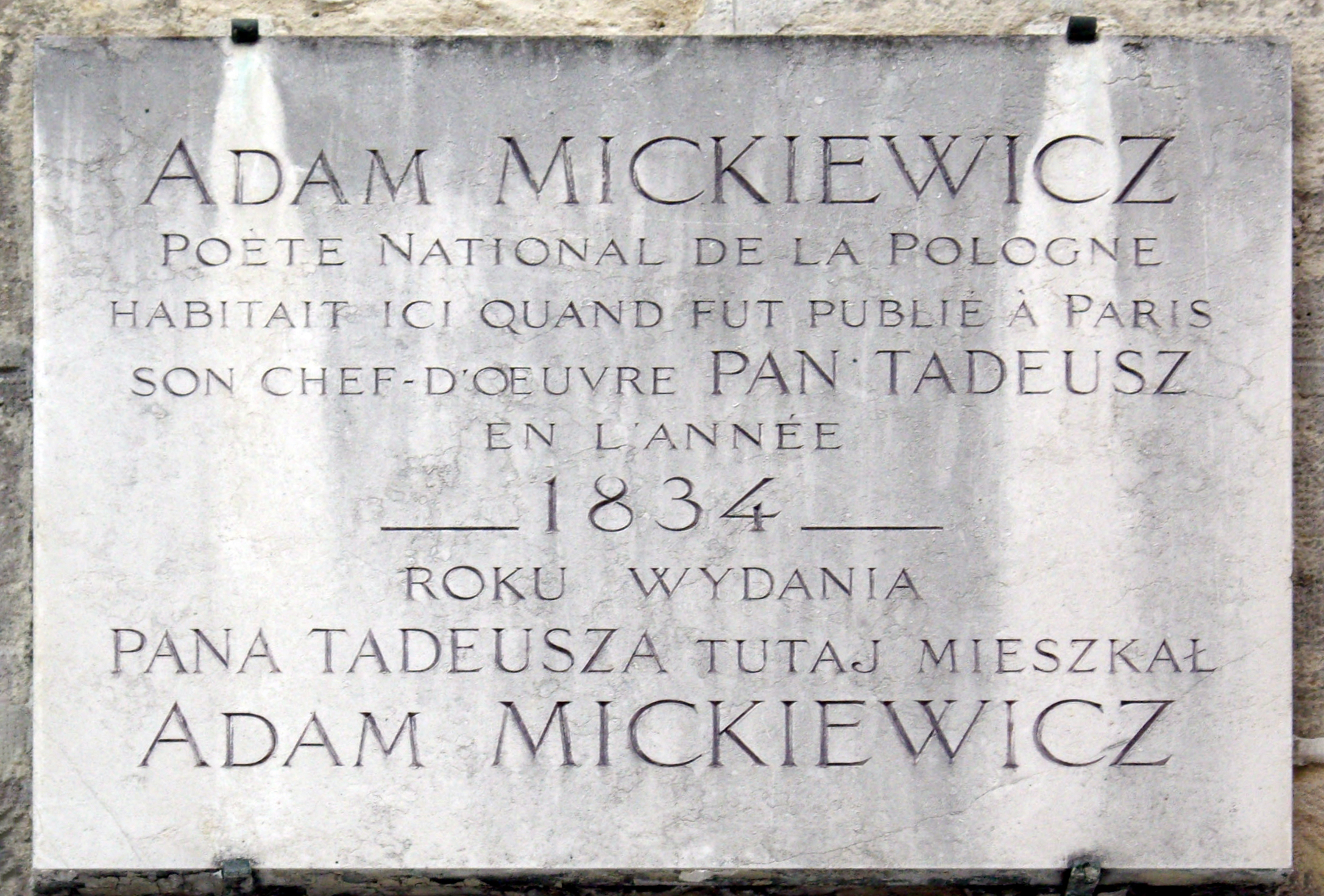 Plaque apposée au n° 63 de la rue de Seine, Paris 6e, où habitait le poète et écrivain Adam Mickiewicz (1798-1855) lors de la publication à Paris de Pan Tadeusz en juin 1834.